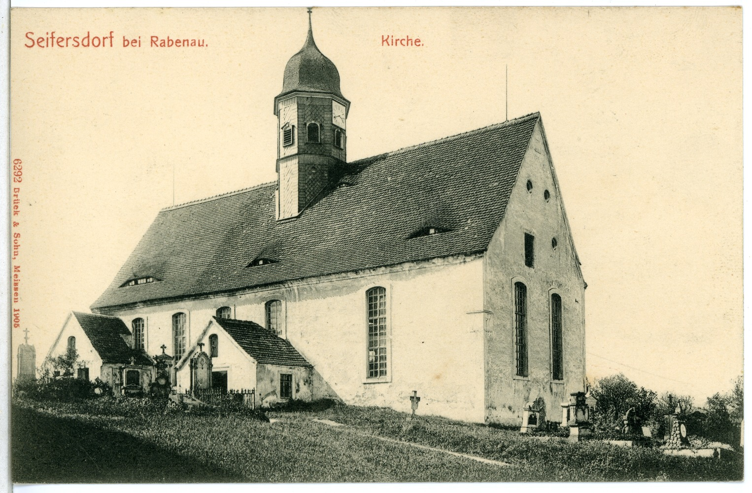 Seifersdorf; Kirche This postcard is from publisher Brück & Sohn in Meißen ( This postcard has a unique number 06292 and is available in a higher resolution at the publisher. This images was uploaded in a cooperation project between Wikipedians and the publisher.